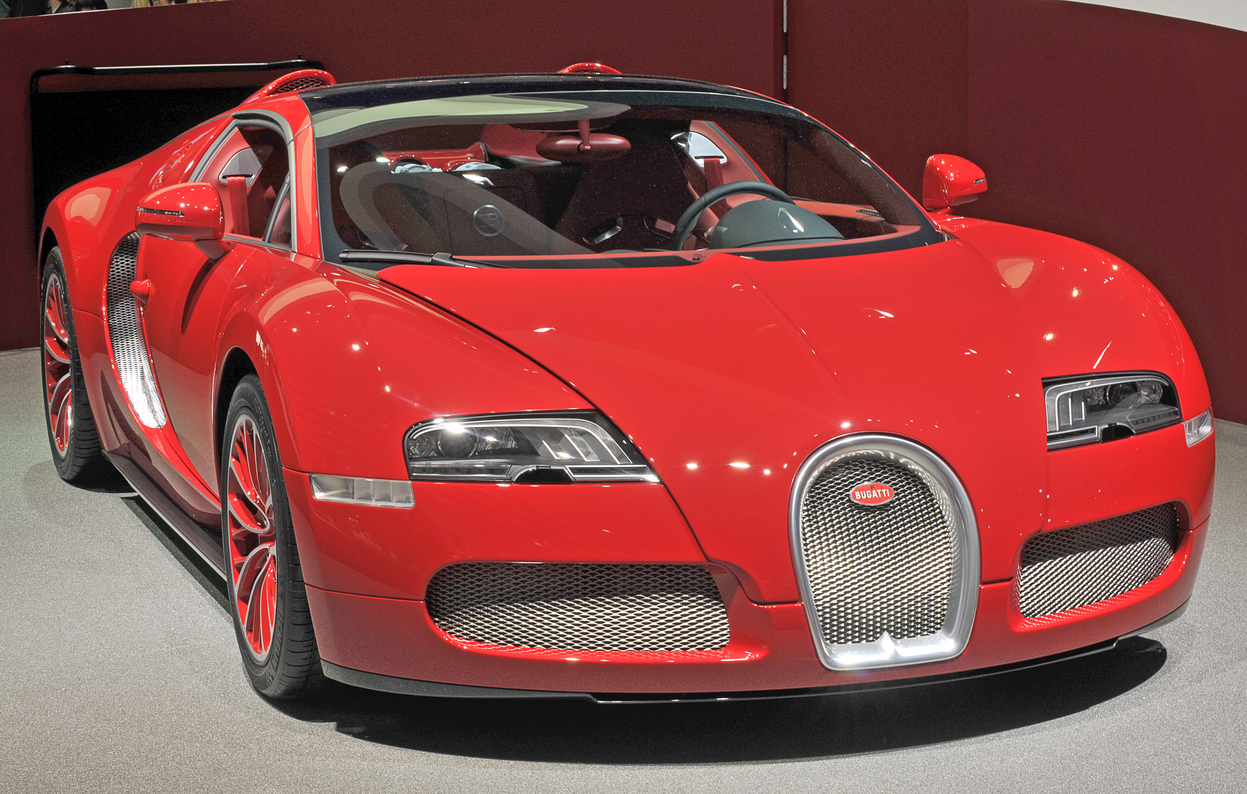 IAA 2011